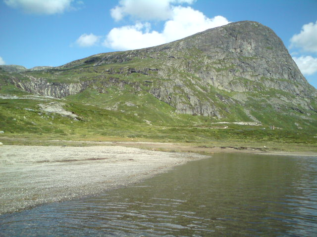 Bygdin i Øystre Slidre